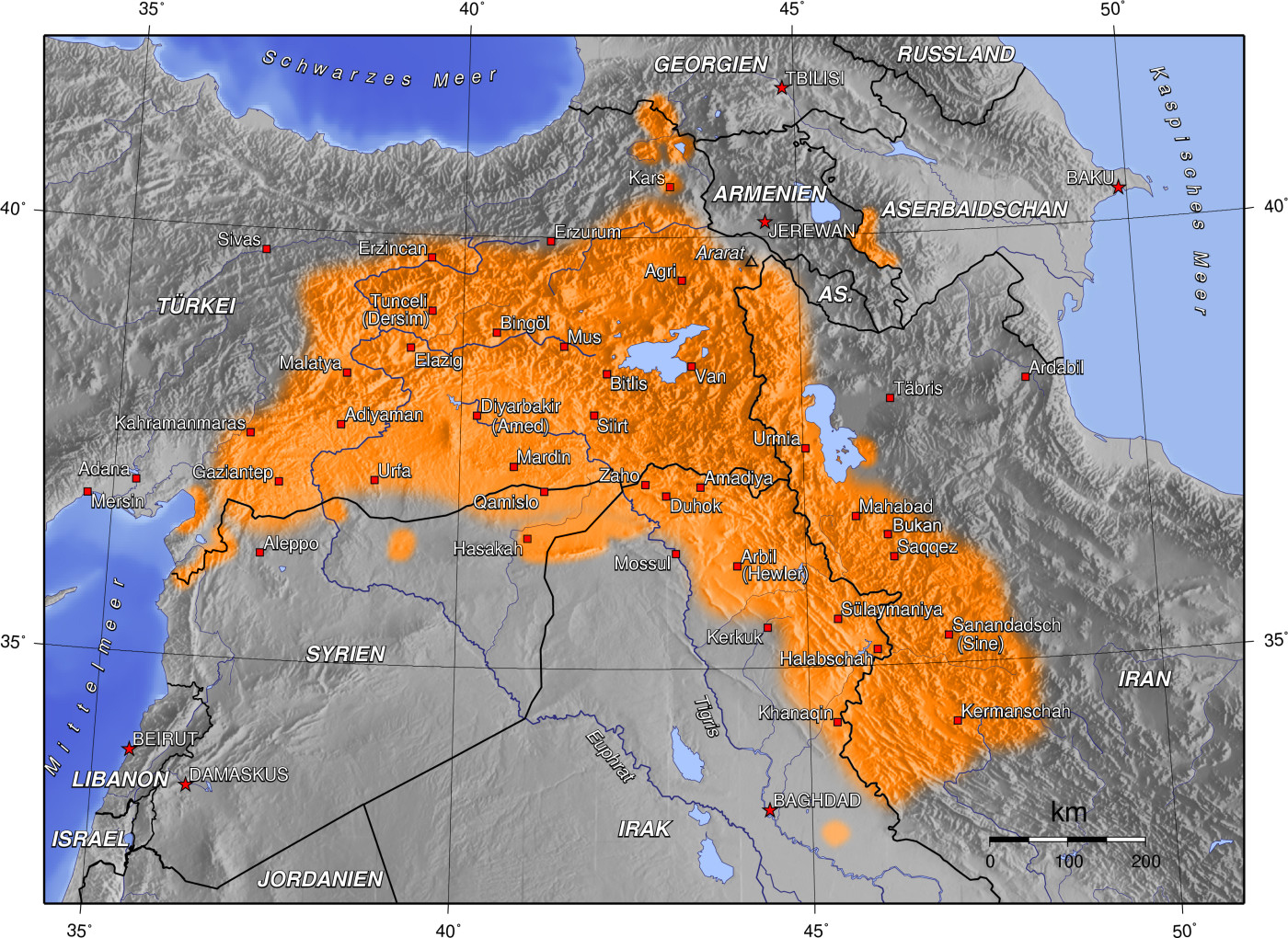 Gegenwärtiges Kerngebiet der kurdischen Siedlungsgebiete